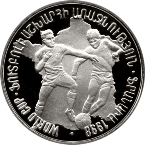 Памятная монета Армении 1998 года "ЧМ по футболу 1998" - 100 драм - серебро 925